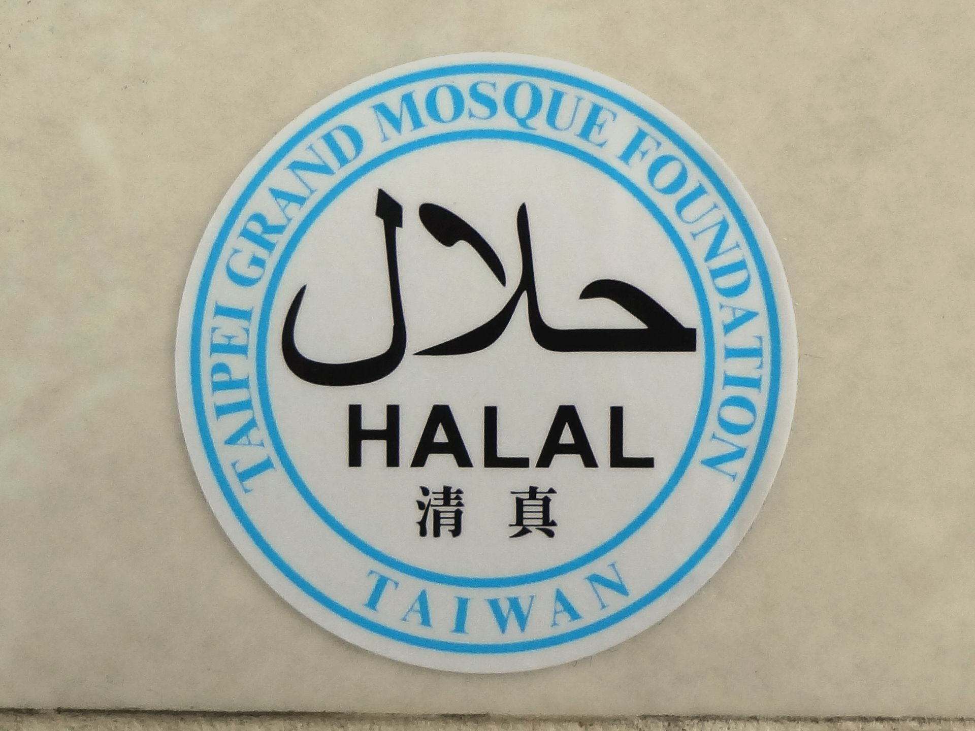 中文（台灣）: 台北清真寺基金會清真認證貼紙。